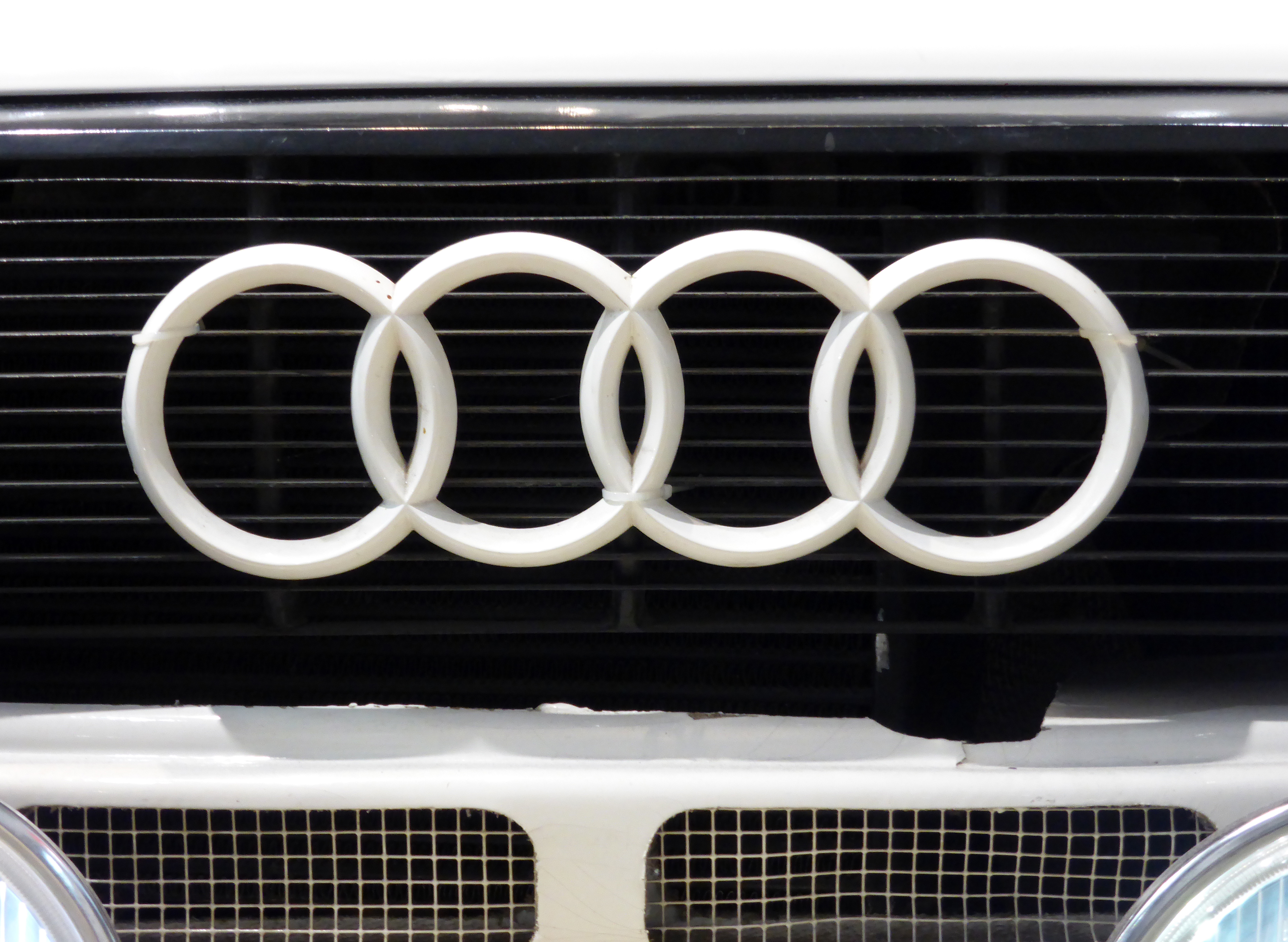 Michèle Mouton, Audi quattro (Rallye-Ausführung, Baujahr 1983) im Deutschen Technikmuseum in Berlin. Wikipedianische KulTour am 10. Oktober 2015 in der Ausstellung des Museums.